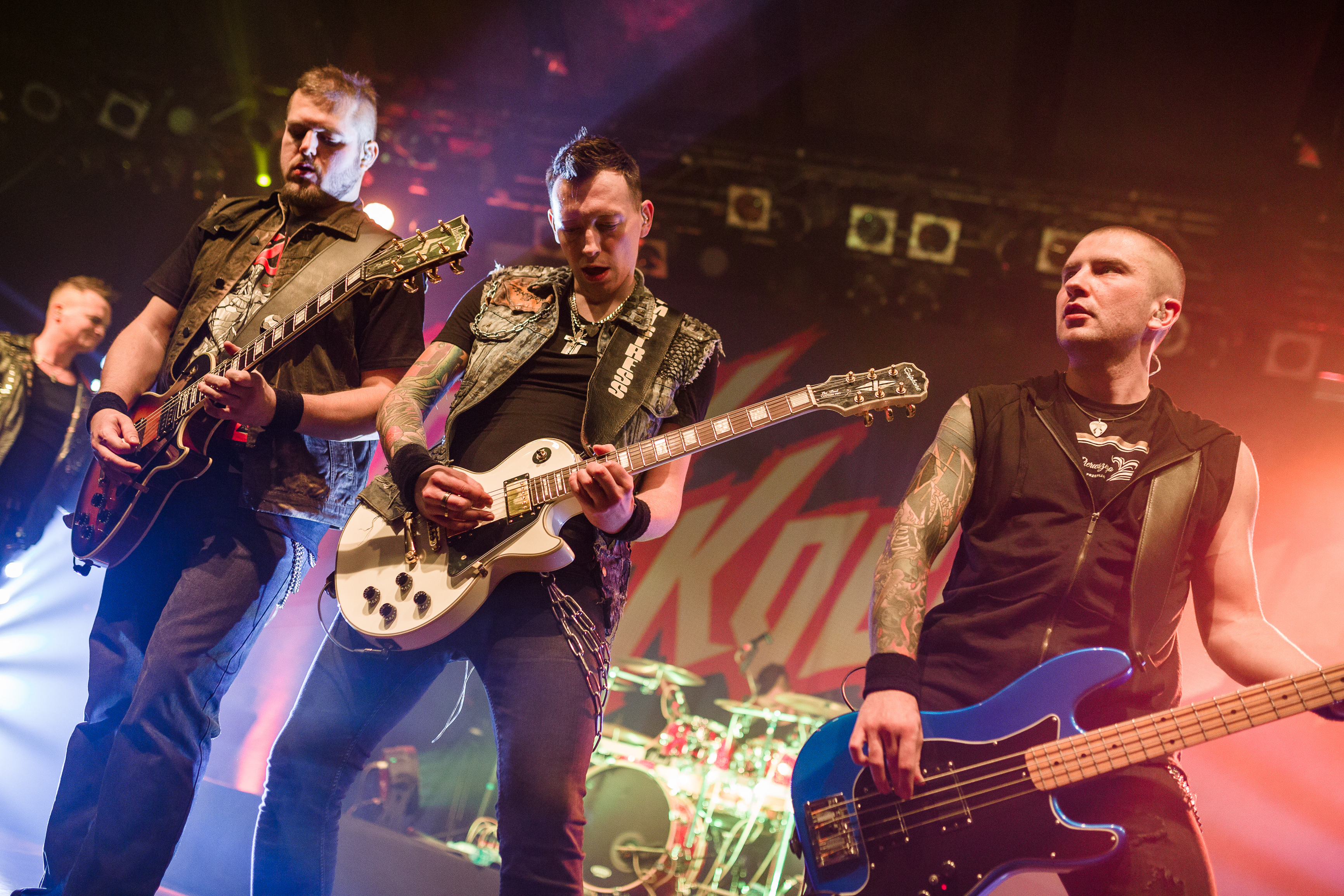 Nocny Kochanek na koncercie promującym płytę "Zdrajcy Metalu" w klubie Progresja.